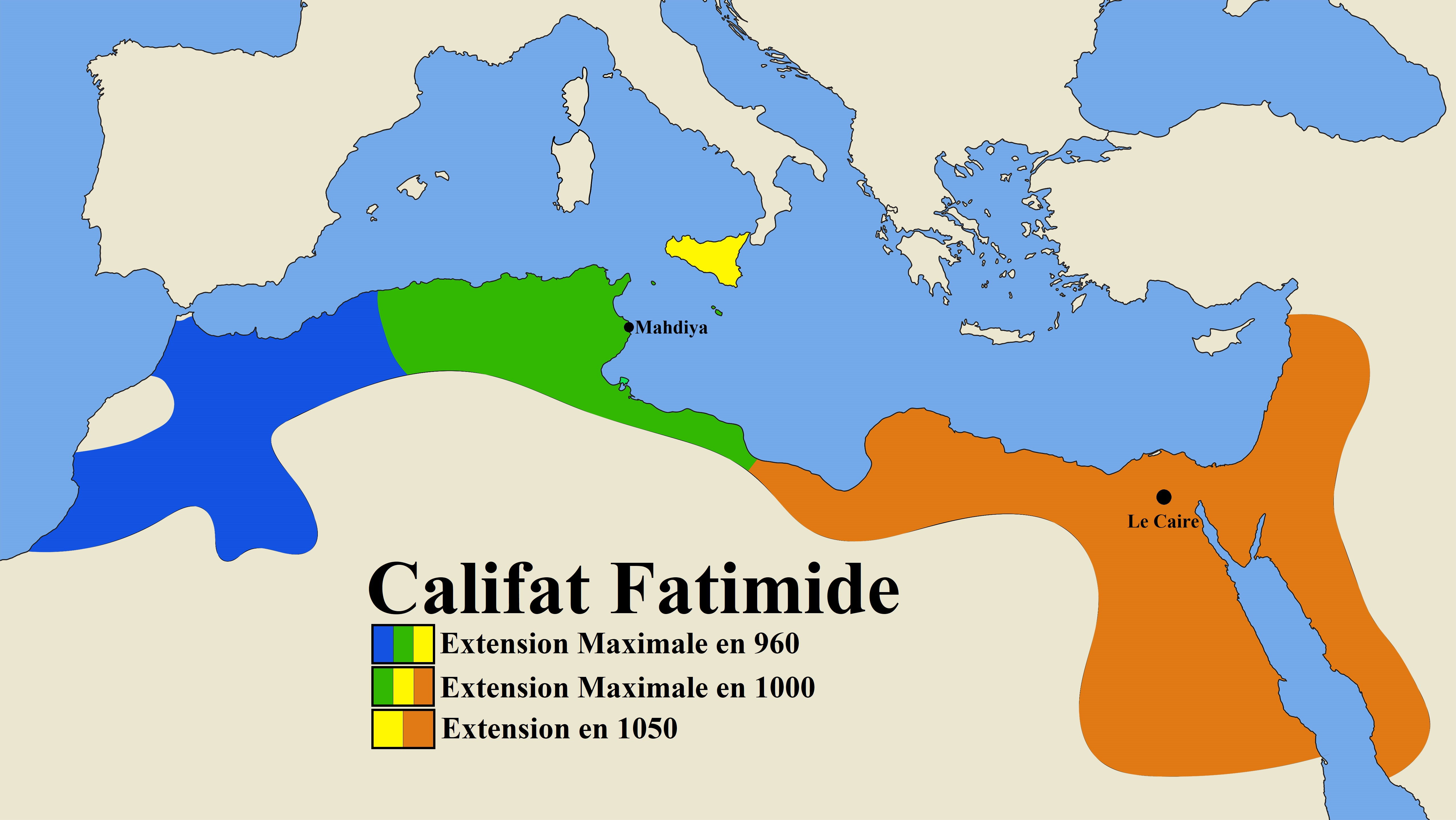 La carte du Califat Fatimide à ses diverses extensions en 960, 1000 et 1050